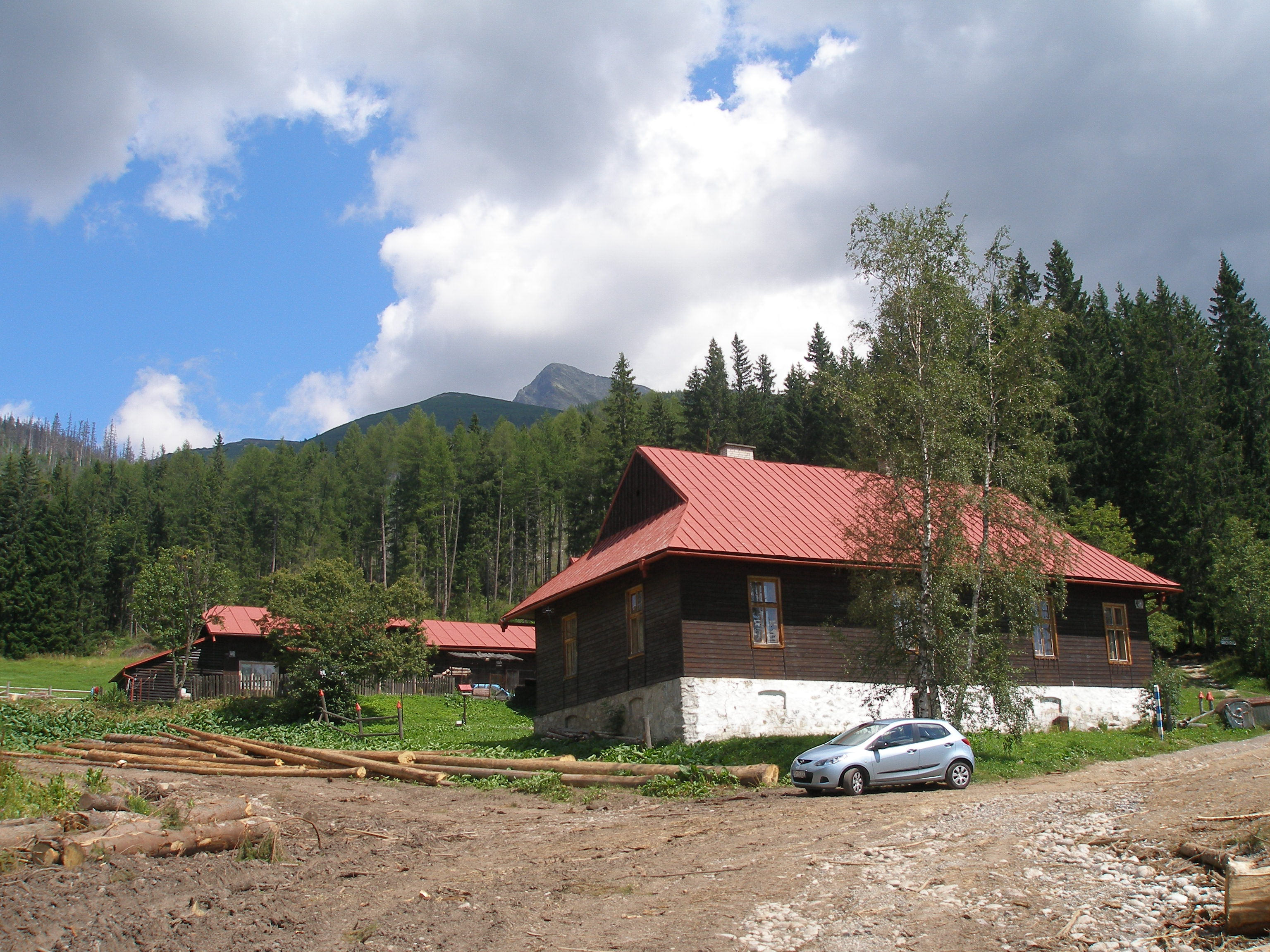 Tri Studničky, pôvodne na starých mapách označené ako Tri studne sú turisticky známym miestom pri Podbanskom vo Vysokých Tatrách. V lokalite sa nachádzajú drevené domčeky patriace lesnej správe. Pri dobrej viditeľnosti je vidieť tatranský štít Kriváň.